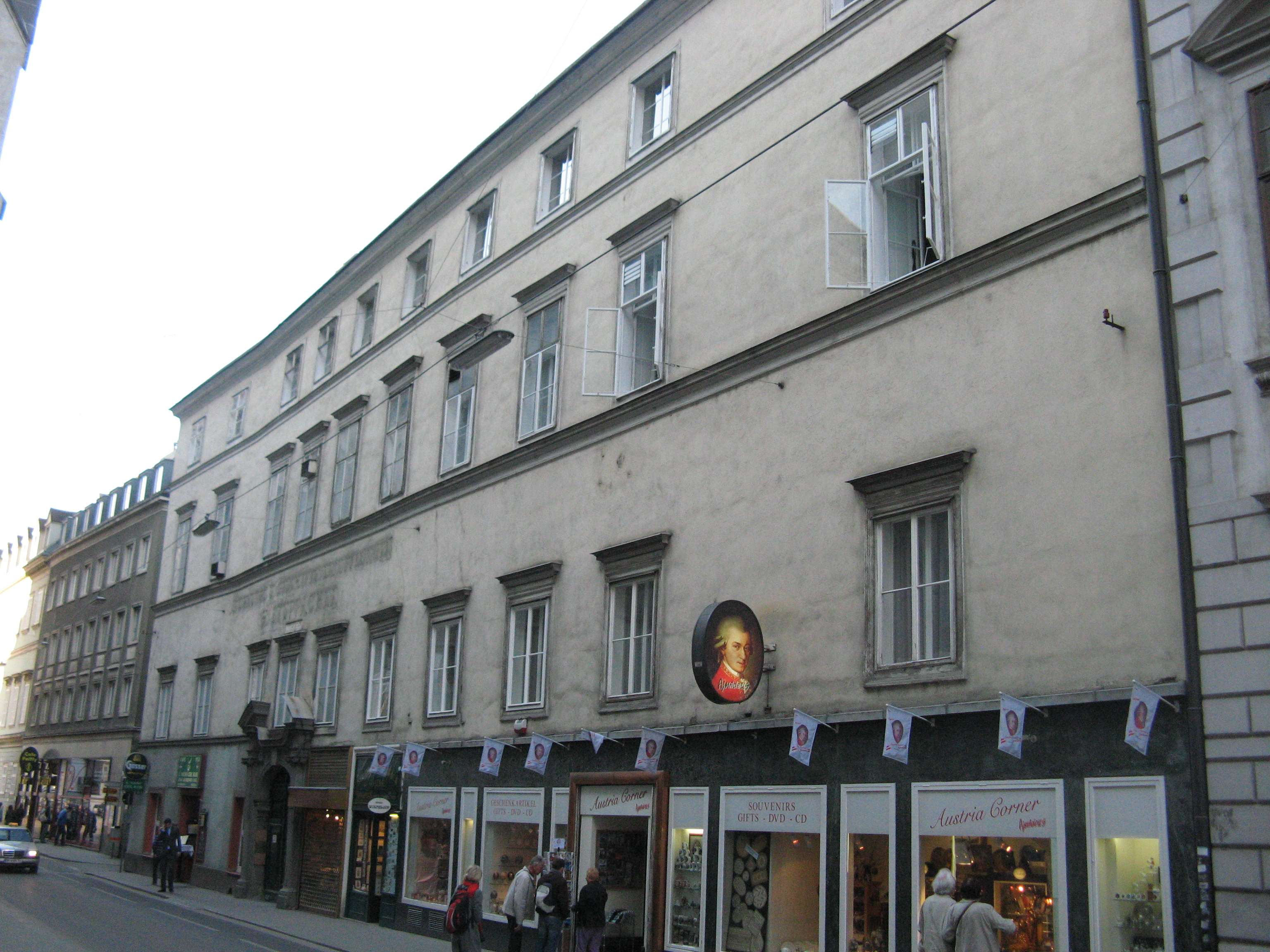 Ungarisches Haus (Anfang 18. Jh.), Augustinerstraße 12, Wien-Innere Stadt